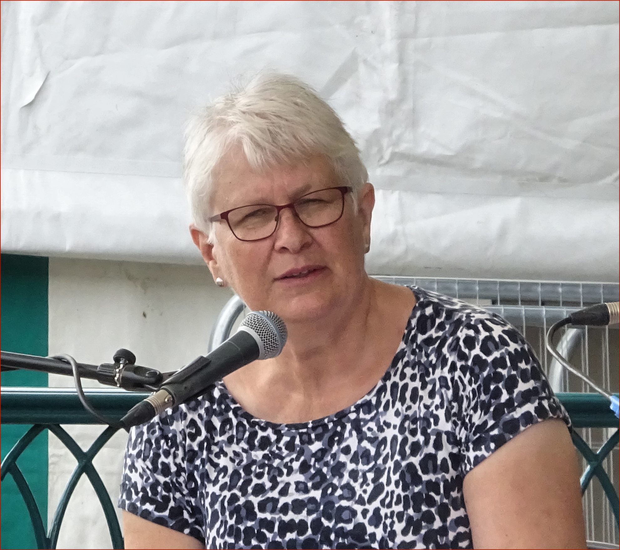 Christine James (Cyn-Archdderwydd), Eisteddfod Caerdydd, Awst 2018.